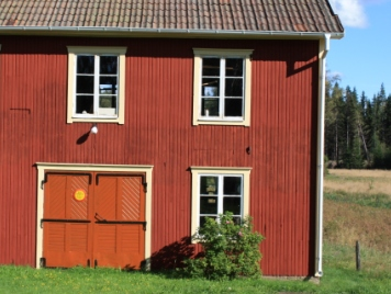 Smedjan